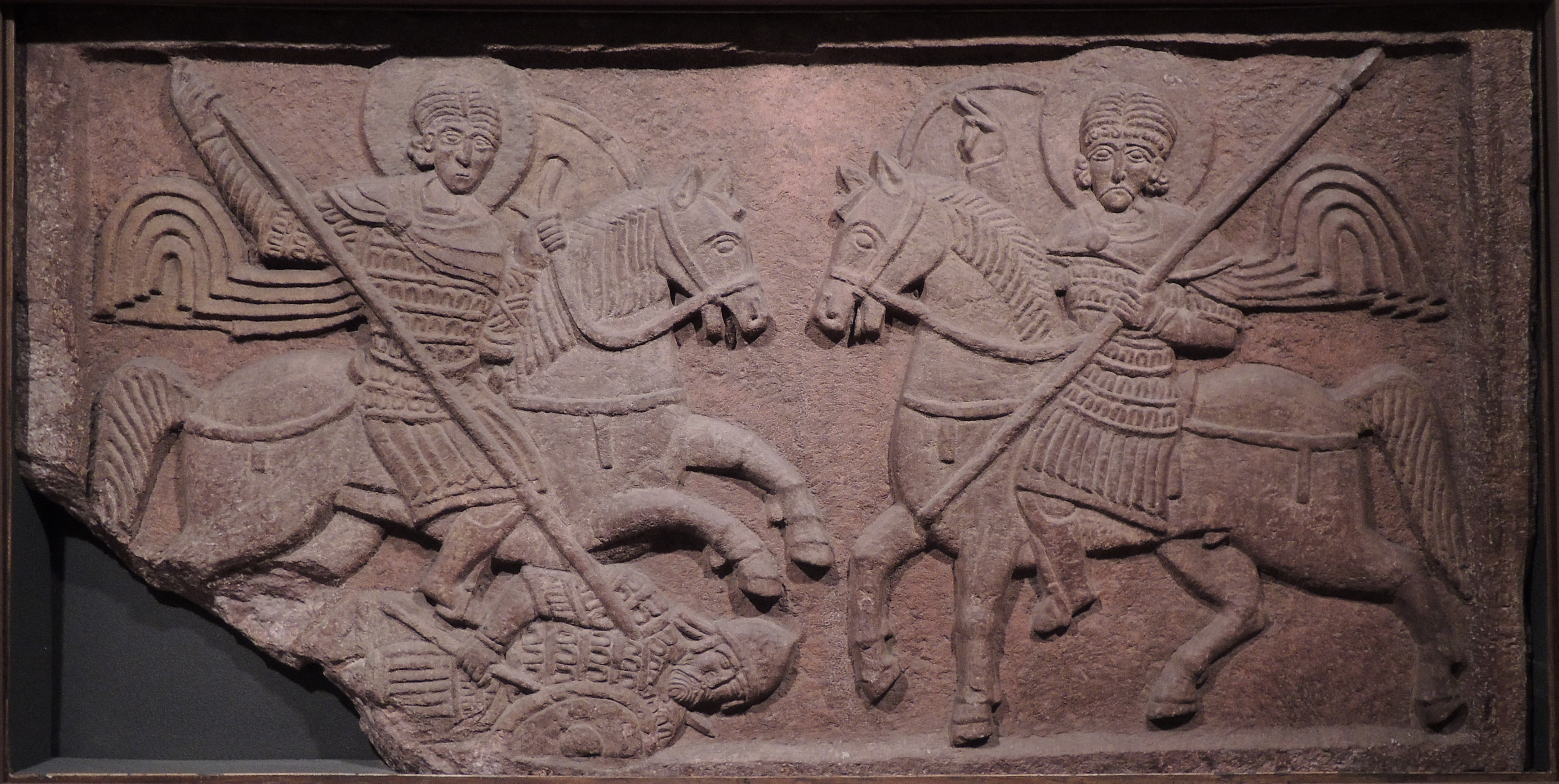 «Два всадника» («Нестор и Дмитрий»), шифер. Рельеф с фасада собора Михайловского монастыря в Киеве. XI век (ок. 1062 г.), ГТГ. Поскольку церковь Архангела Михаила в 1930-е годы была разрушена, мозаики и фрески были сняты со стен профессором В.А.Фроловым и некоторые из них поступили в 1938 году в Государственную Третьяковскую галерею.